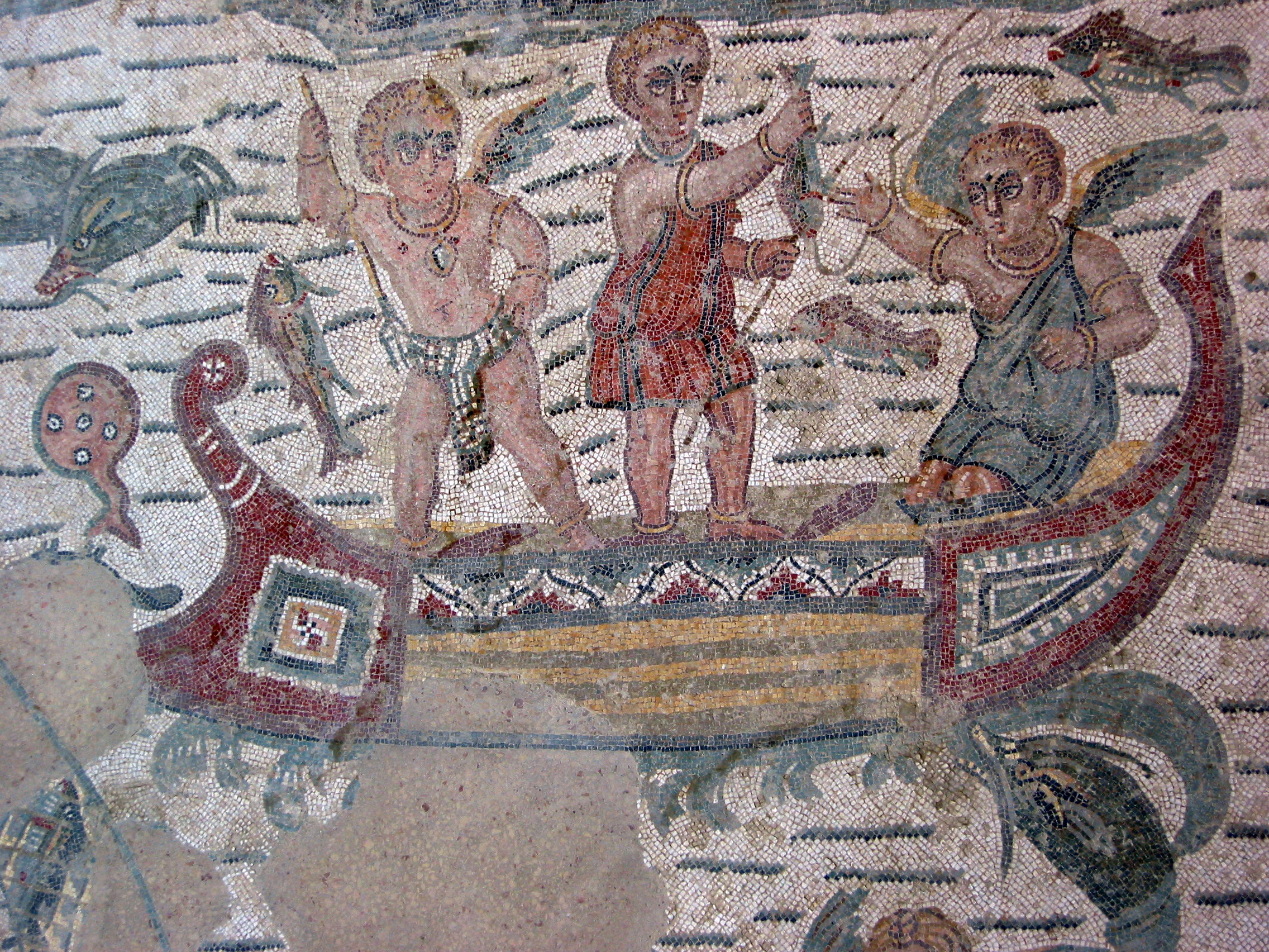 Villa Romana del Casale, Piazza Armerina, Sicily/Sicilia, Italy/Italia